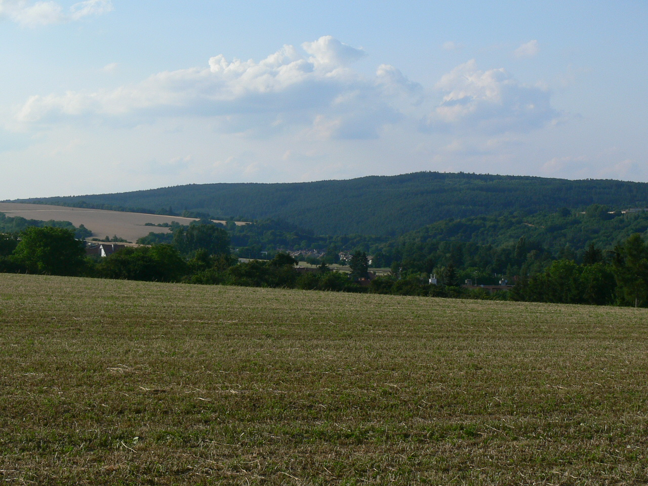 Dědice, údolí Hané, Hamiltony